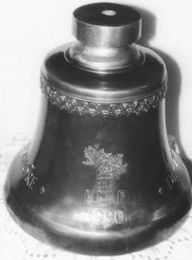 Zvon Jan v místní kapličce